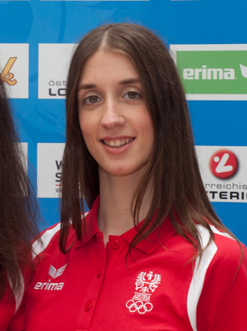 Einkleidung der Österreichischen Teilnehmer an den Olympischen Sommerspielen 2016 am 16./17. Juli 2016 in Wien. Bild zeigt Eirini-Marina Alexandri.